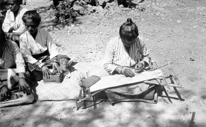 Repronegatief. Ikat techniek in Amarassi op Zuid Timor